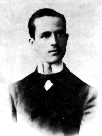 José Arnaldo Márquez (1832-1903) poeta, dramaturgo, ensayista, maestro, periodista, traductor, diplomático, militar y viajero peruano.